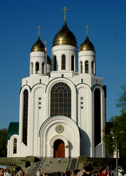 Russische Föderation: Christ-Erlöser-Kathedrale in Kaliningrad